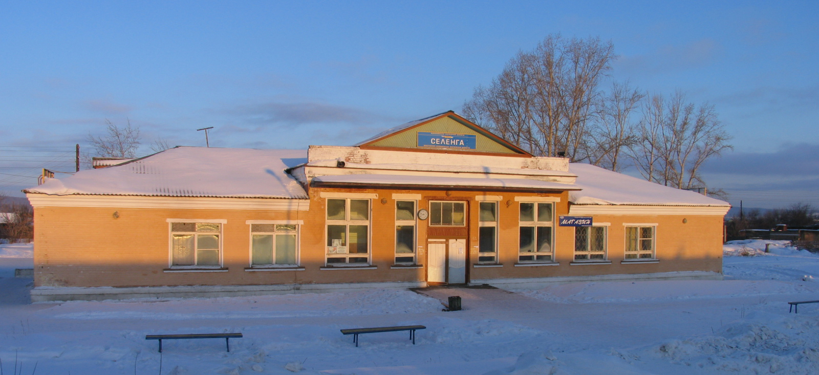 Железно-дорожная станция Селенга